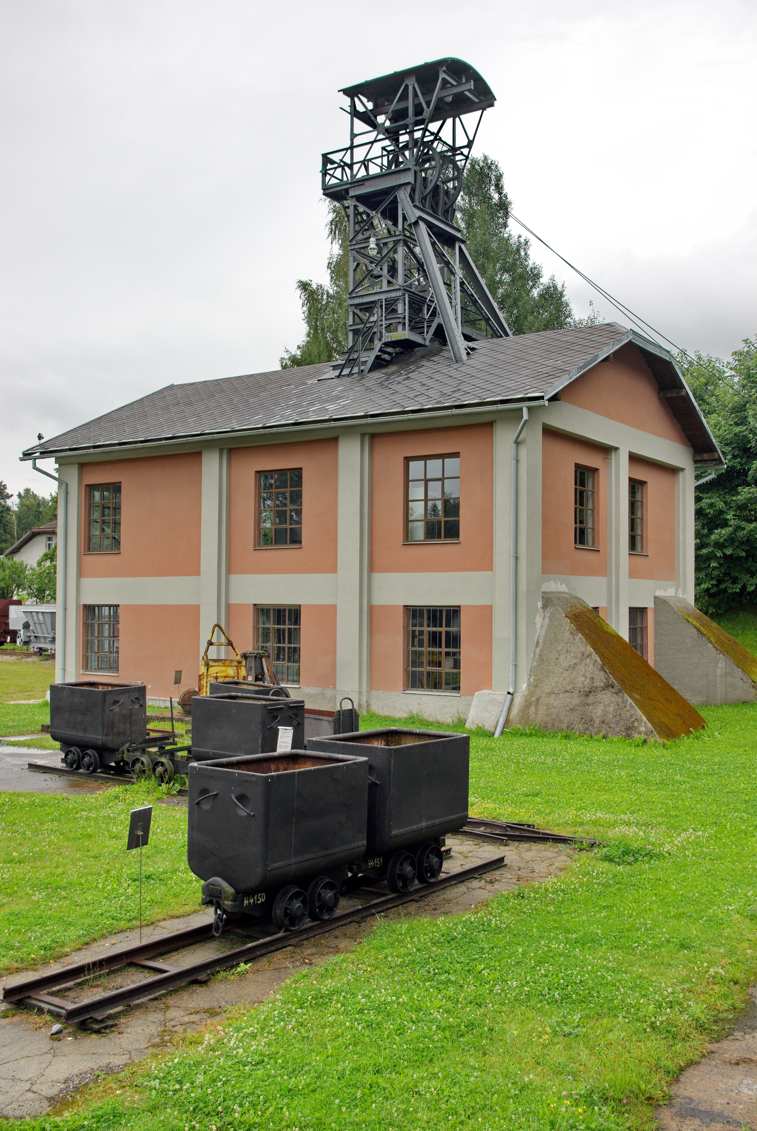 Krásno, těžní věž dolu Vilém